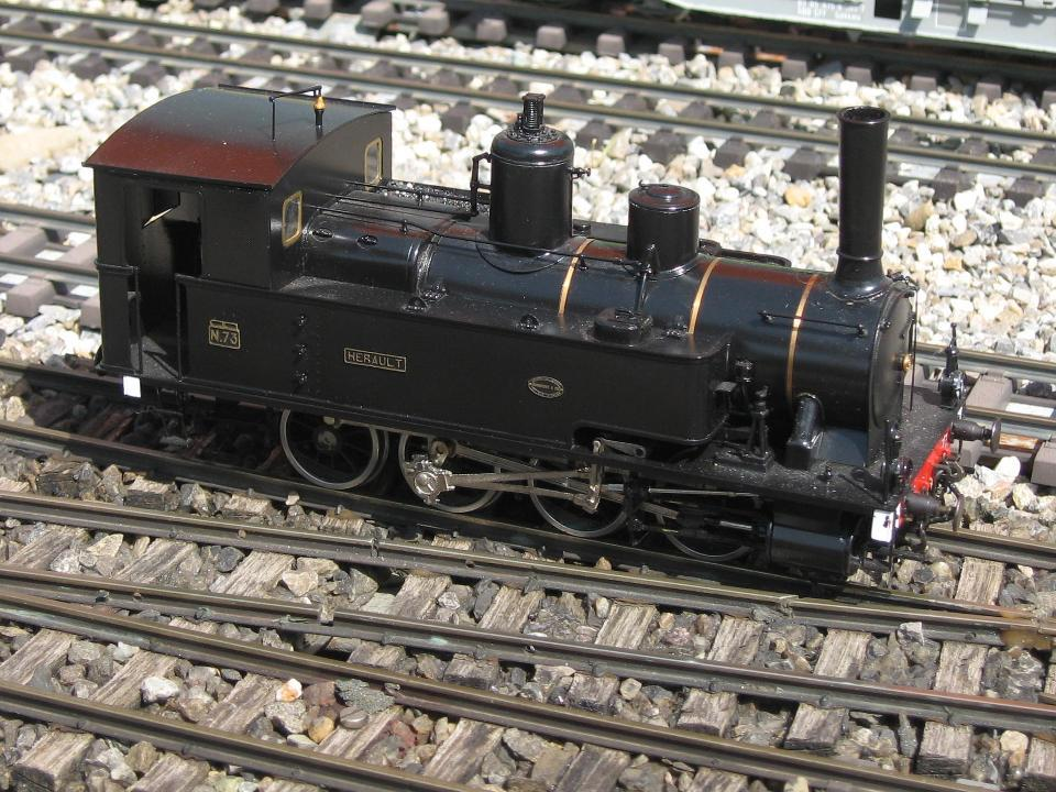 Spur 0 Modell der 040T Tenderlokomotive N.73 Herault der Chemins de fer de l'Hérault auf der Gartenbahn Anlage des Eisenbahn-Modell-Club Hindelbank (EMCH).